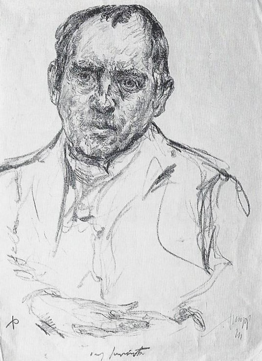 Porträtzeichnung des Malers Lovis Corinth